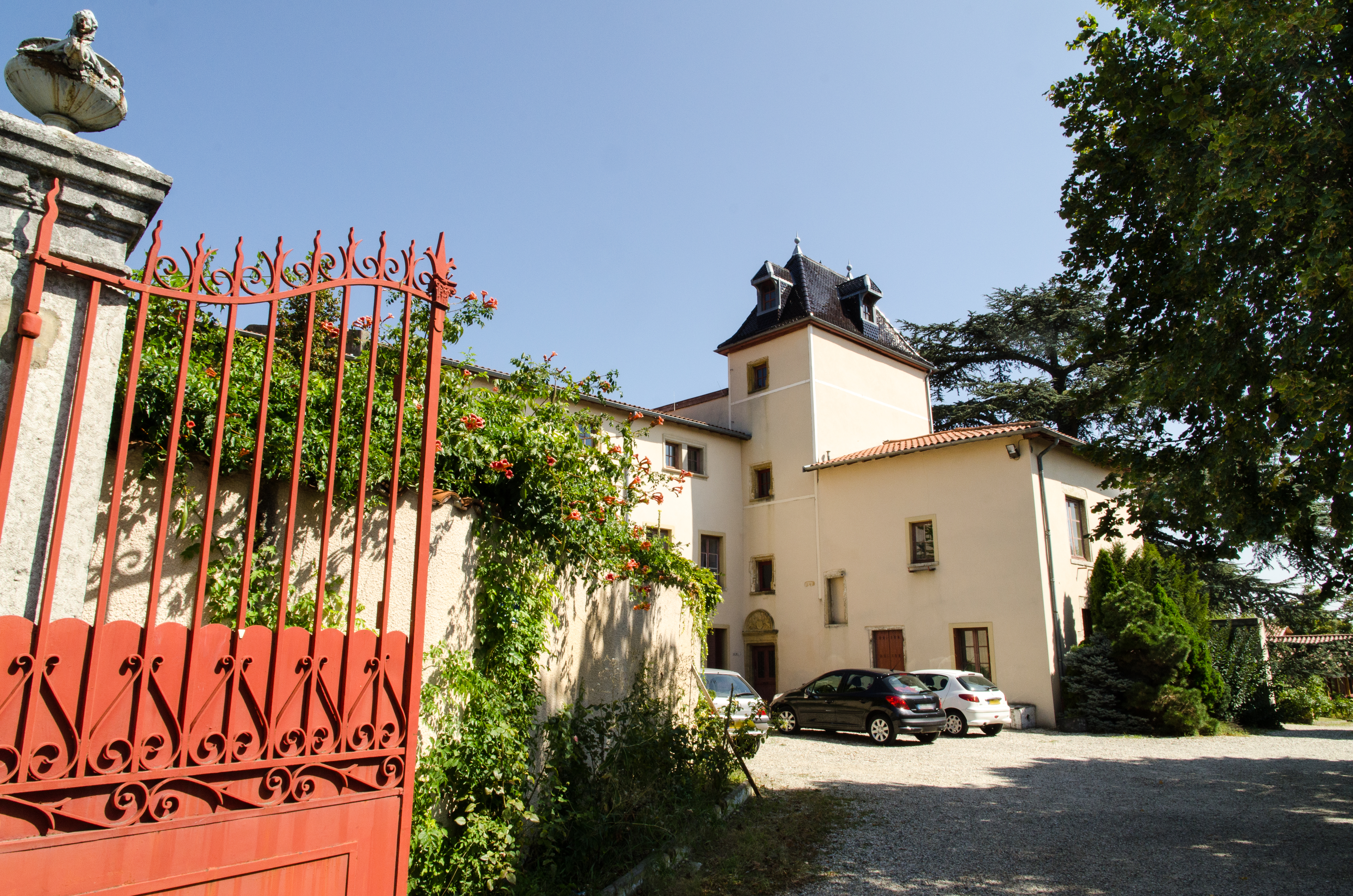 Château de la Barge, Grézieu-la-Varenne, Rhône .